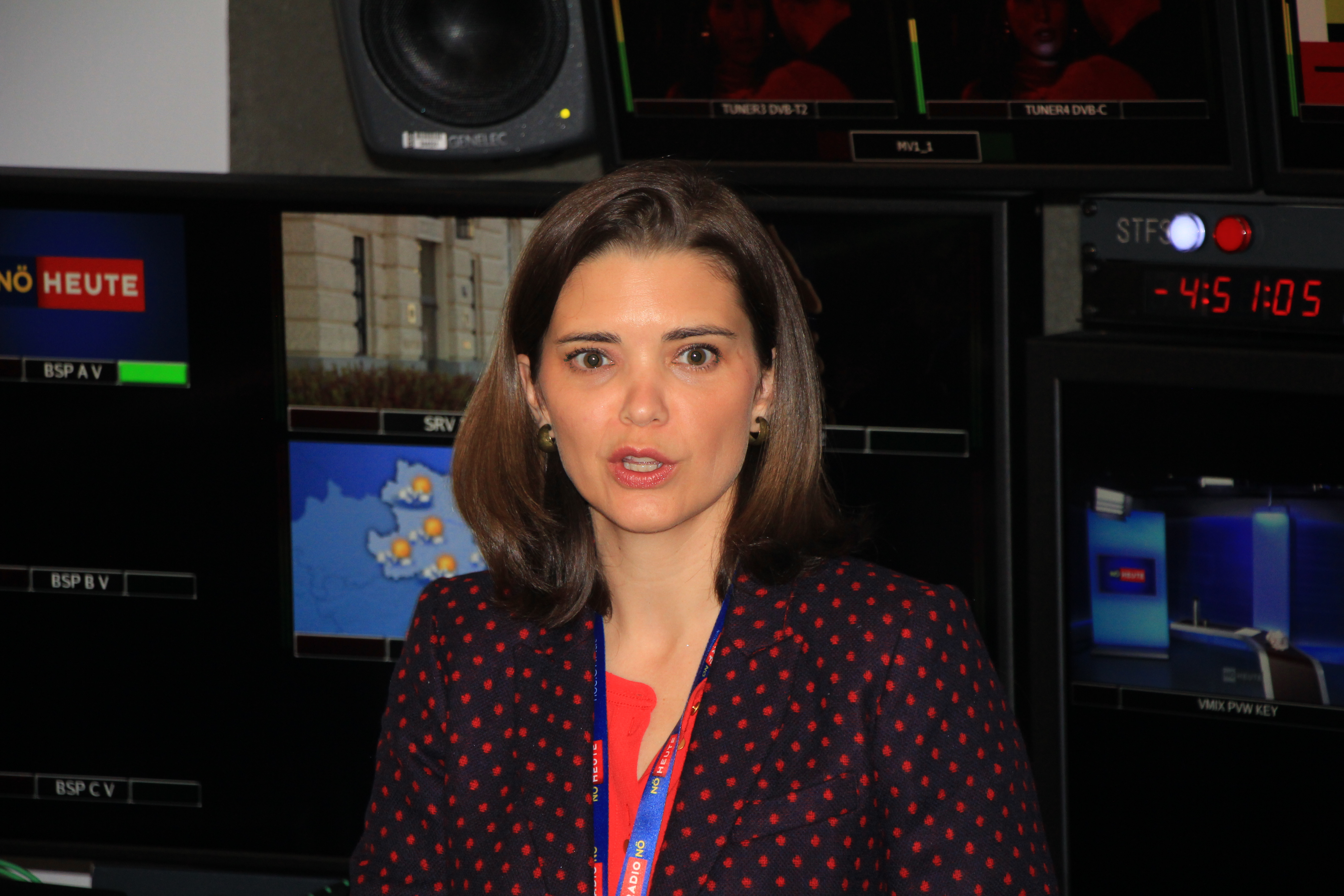 Schnappschüsse von Moderatoren am Tag der offenen Tür beim 50-Jahr-Jubiläum des ORF-Niederösterreich; Claudia Schubert erklärt den Regieplatz